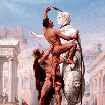 detail